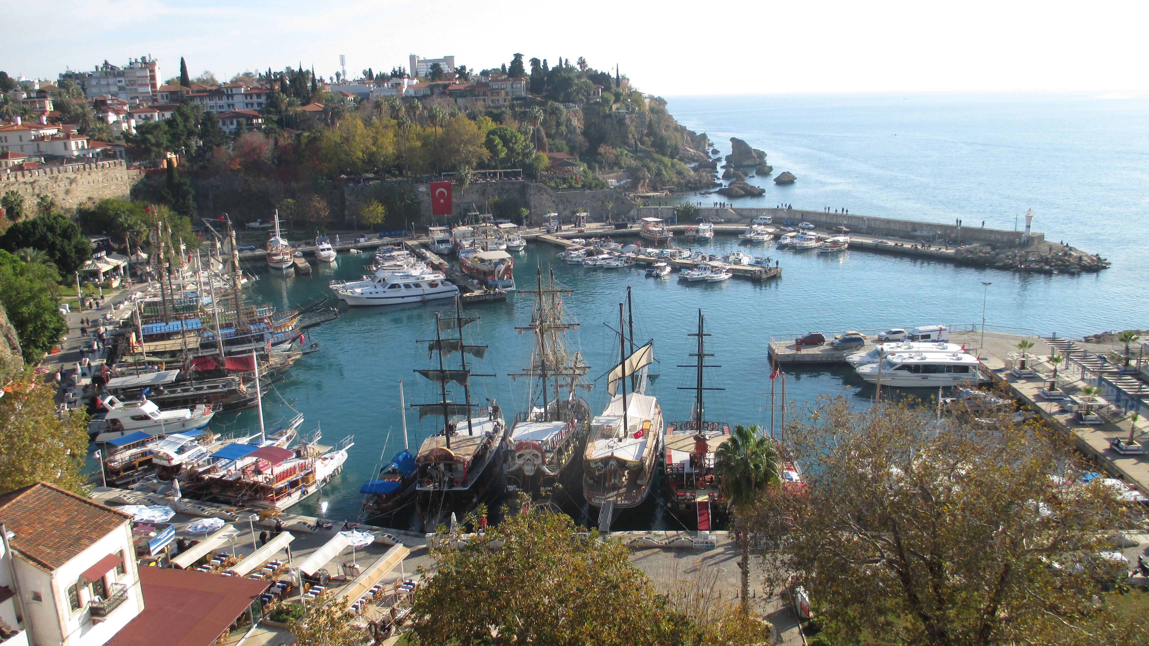 Yachthafen von Antalya und Altstadt (Kaleiçi).